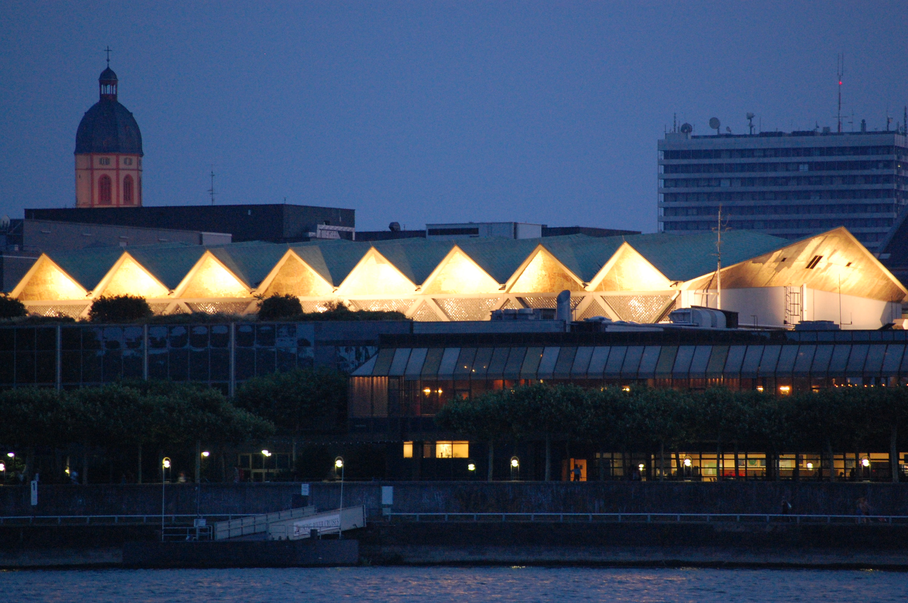 Rheingoldhalle in Mainz am Rheinufer, erbaut von 1965 bis 1968